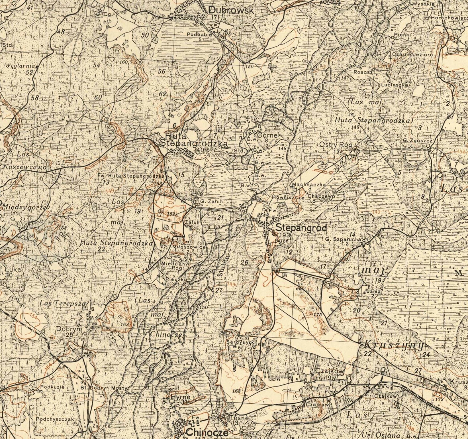 Степангород на польській карті